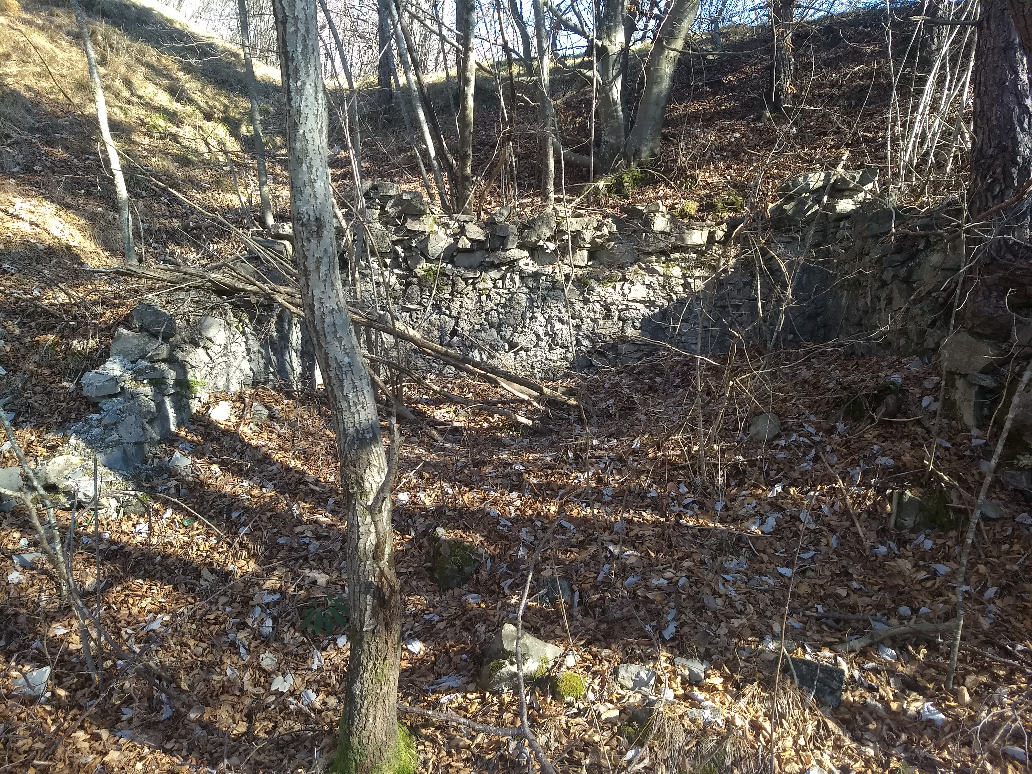 rudere a Magasa